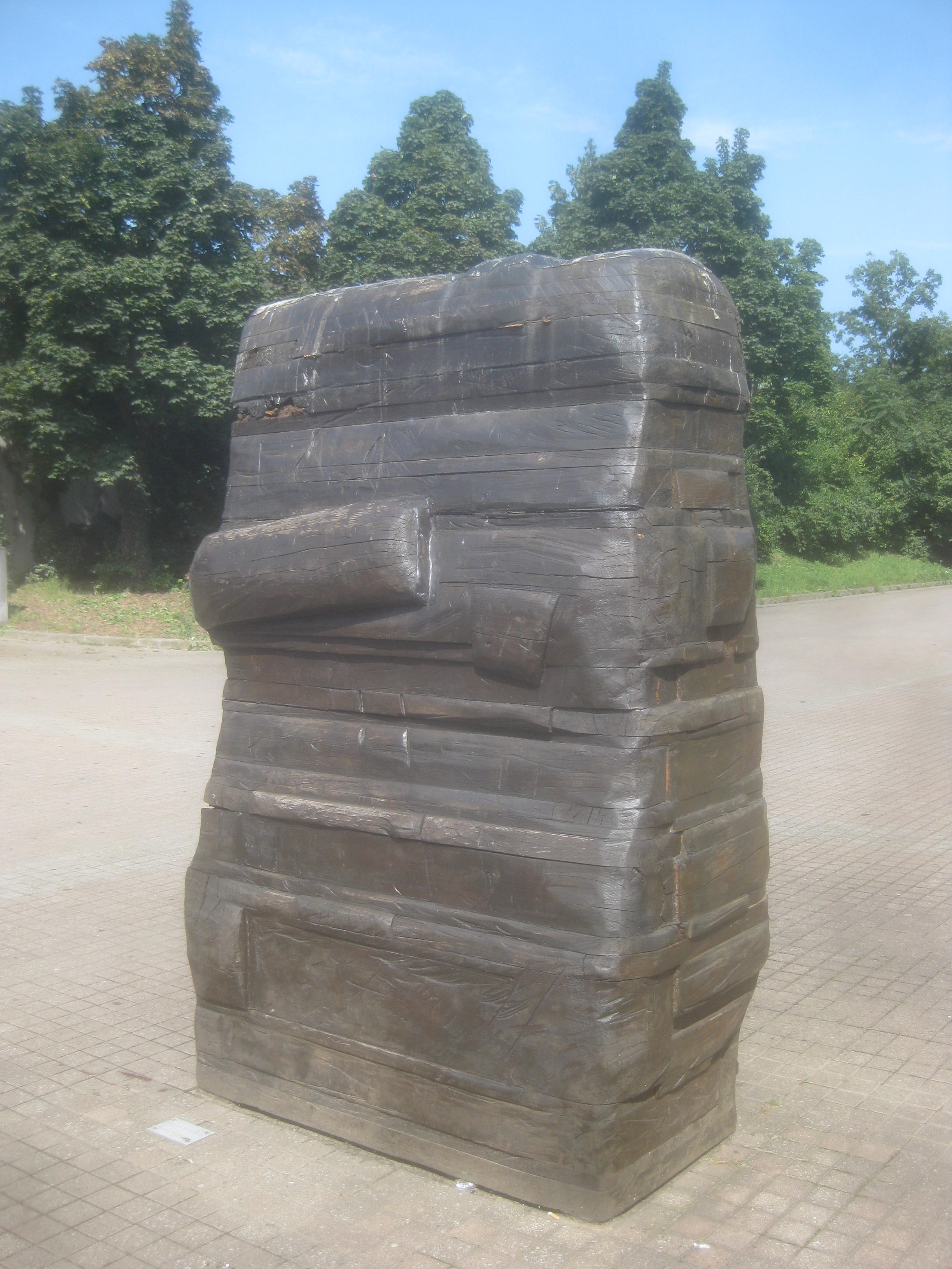 Großes Rumpfholz, Skulptur von Ingrid Hartlieb, Holz, 1984/2006, Stuttgart-Zuffenhausen, Am Bahnhof 1, Bahnhofsvorplatz.